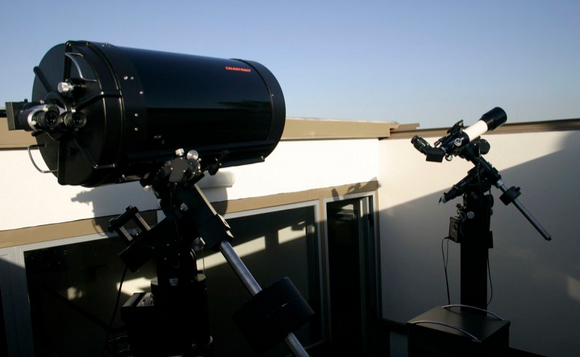 Observatorio Astrodomi I37. Cunta con 2 telescopios orientados a busqueda de objetos y astrofotografía.